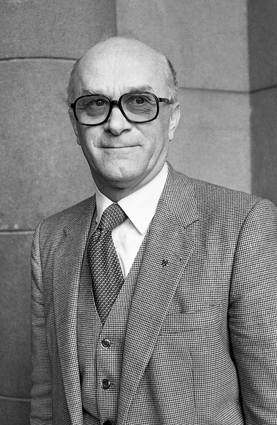 Srpski (latinica): Raif Dizdarević (Fojnica, 9. decembar 1926), učesnik Narodnooslobodilačke borbe i društveno politički radnik SFR Jugoslavije i SR Bosne i Hercegovine. U periodu od 15. maja 1988. do 15. maja 1989. godine obavljao je dužnost predsednika Predsedništva SFRJ.